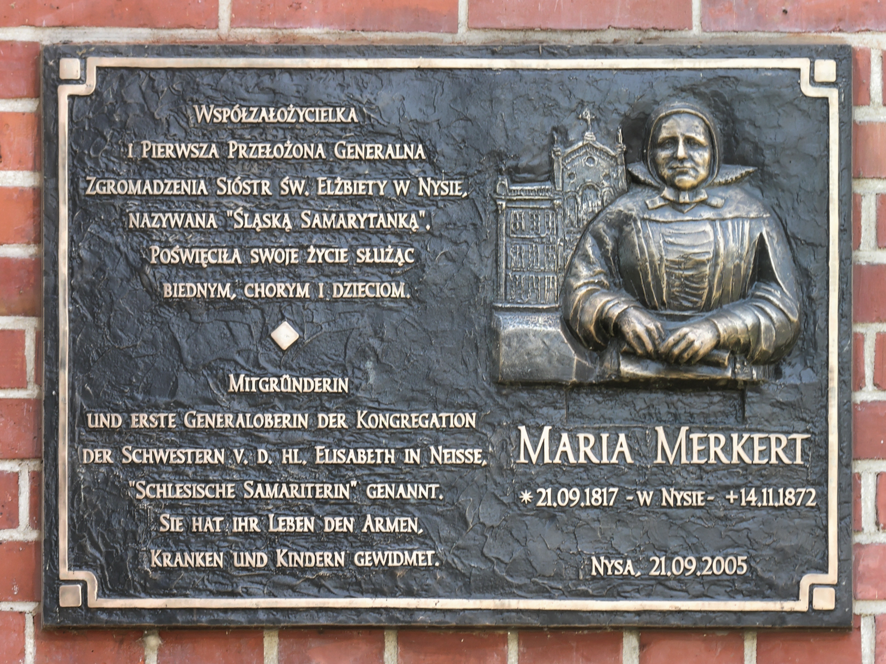 Tablica pamiątkowa ku czci Marii Merkert w Nysie, ul. Marcinkowskiego 6/8